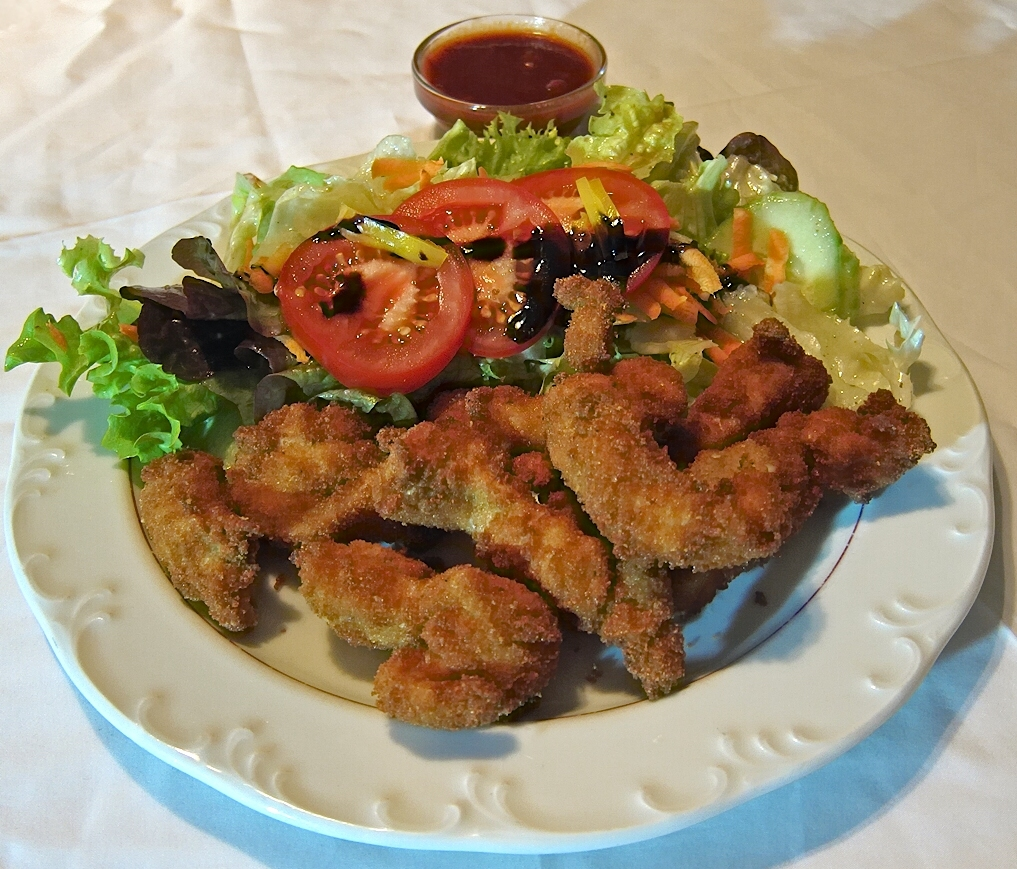 Backhendl mit gemischtem Salat und Barbeque-Dip.